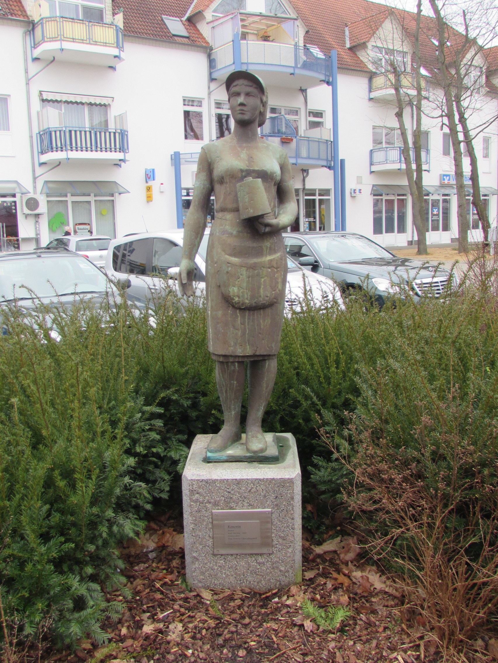 skulptur konerin, premnitzer stadtzentrum, Karl Mertens, 1965, bronze